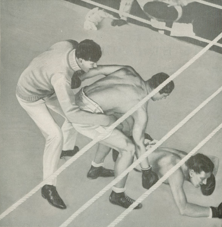 Le 8 décembre 1913, Georges Carpentier met KO Bombardier Wells au premier tour au National Sporting Club de Londres.